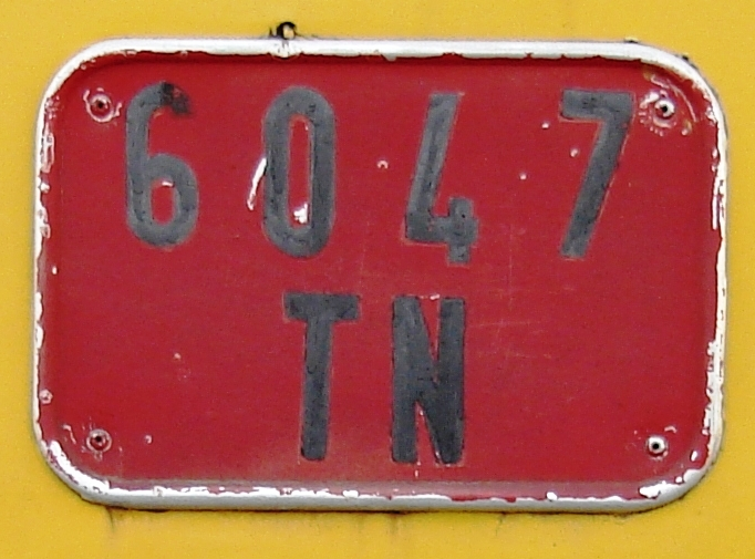 Rotes Kfz-Kennzeichen für Behördenfahrzeuge, zugelassen in der Provinz Antananarivo.